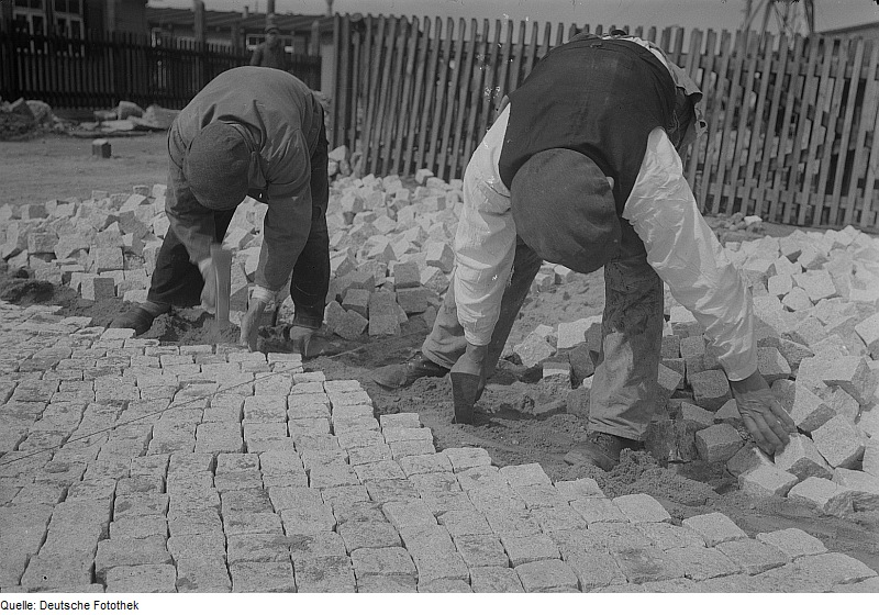 Original image description from the Deutsche Fotothek Dresden. Straßenbauarbeiter beim Setzen von Großpflaster